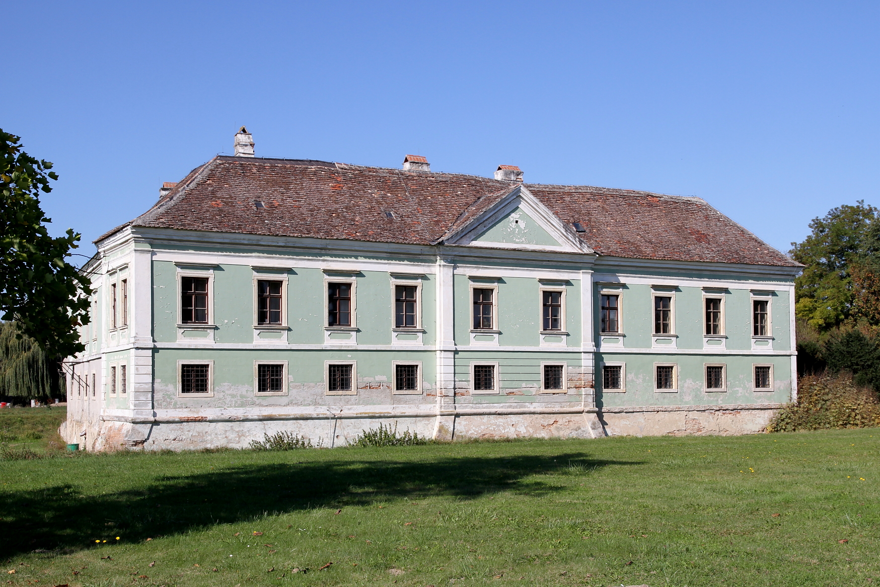 Jagdschloss in Schmida, eine Ortschaft in der niederösterreichischen Gemeinde Hausleiten.